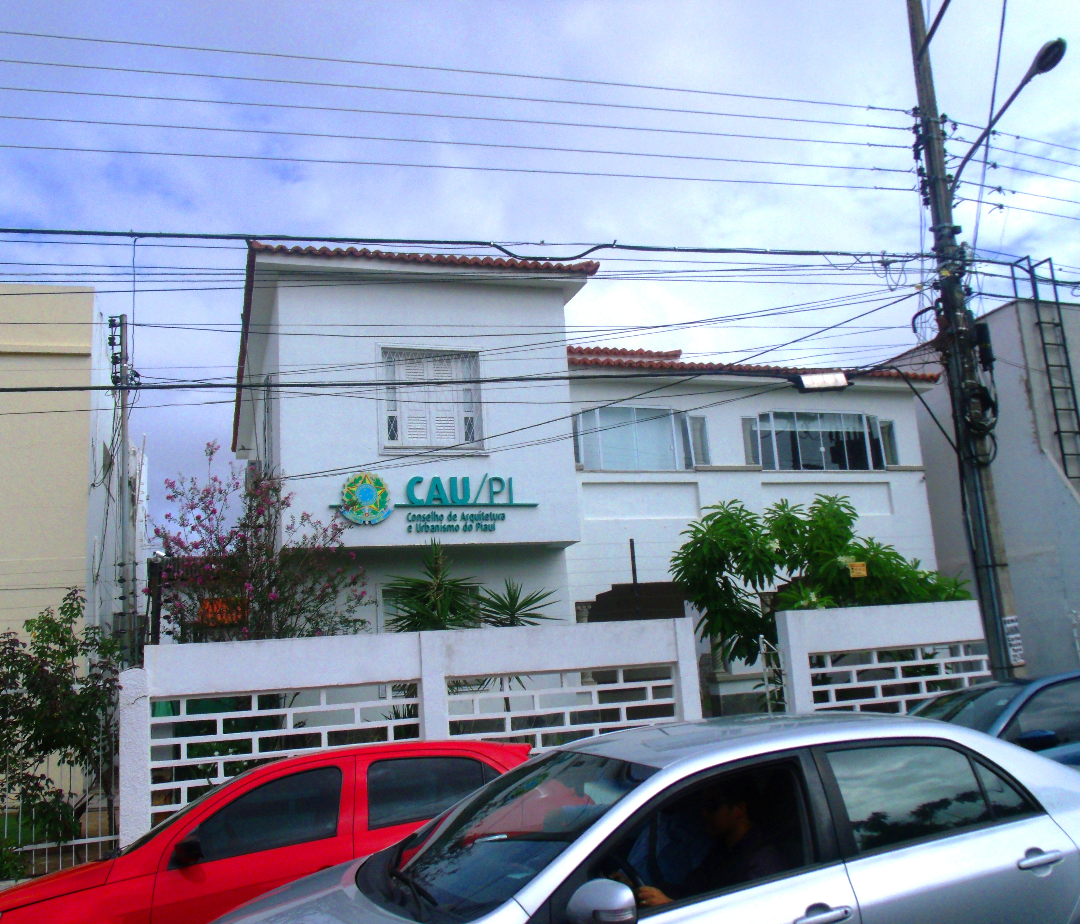 Prédio do Conselho de Arquitetura e Urbanismo do Brasil em Teresina, no Piauí.